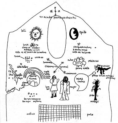 Grafismo de la Pachamama en el Santuario del Sol de Coricancha en Cuzco. Curicancha-Intihuasi según Juan de Santa Cruz Pachacutic Yamqui Salcamayhua en su libro Relación de Antigüedades deste Reyno de Perú, 1613.